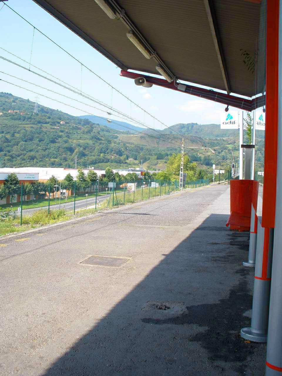 Trapagaran (Vizcaya) - Estación de Adif Cercanías